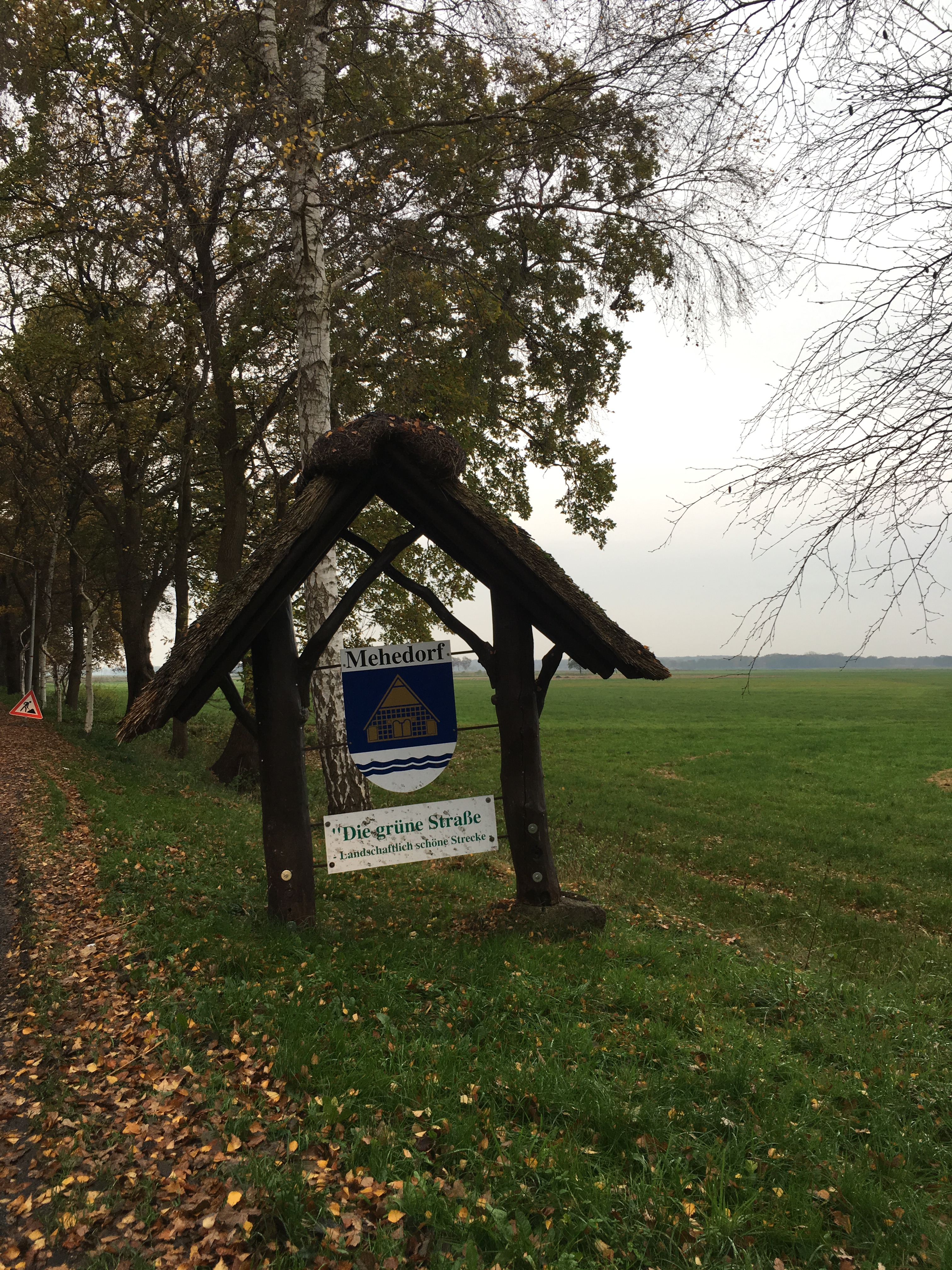 Oortsingang von Mehdörp (von Noordoosten keken), Landkreis Rodenborg